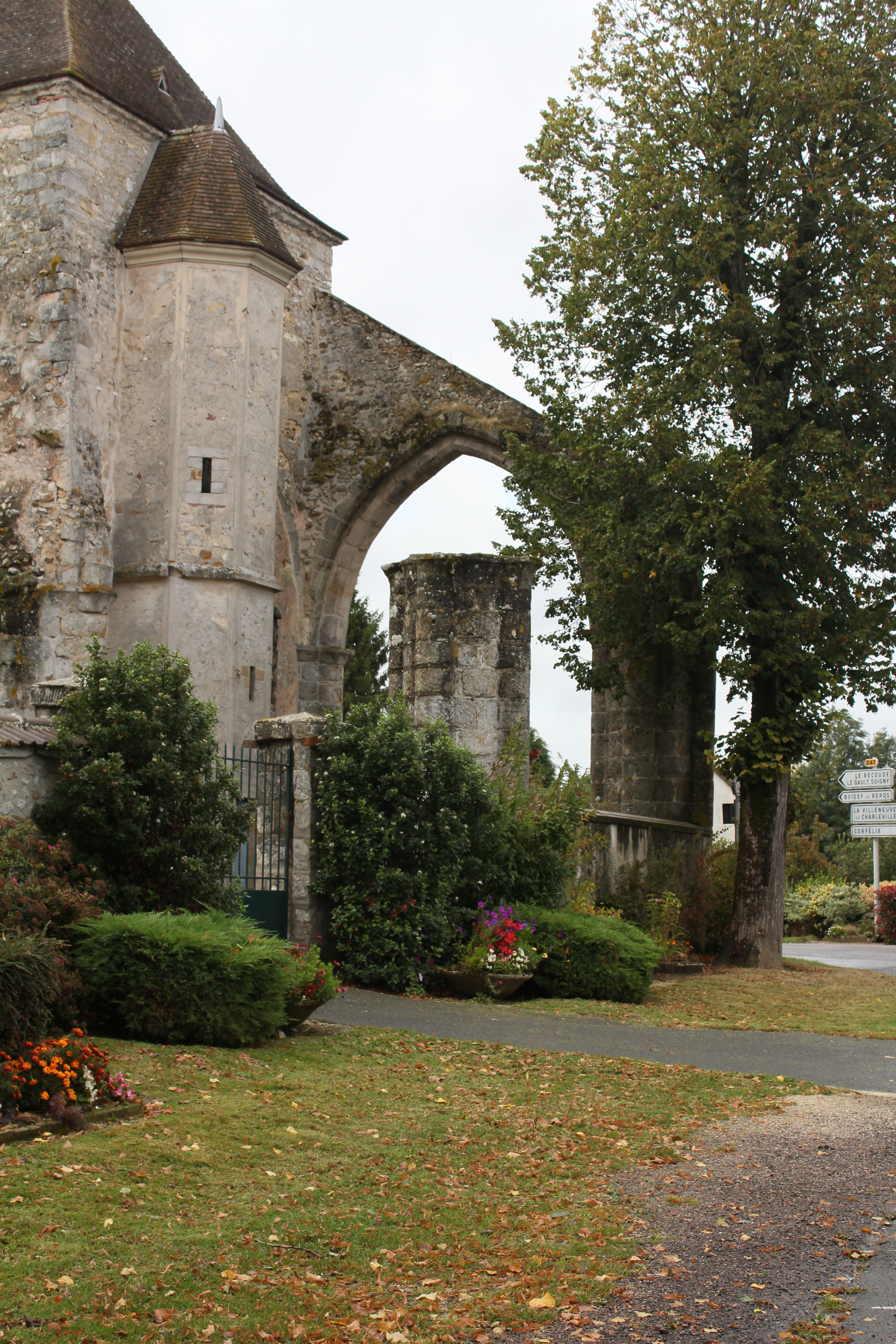 Église Saint-Pierre de Charleville, (Classé, 1920) .